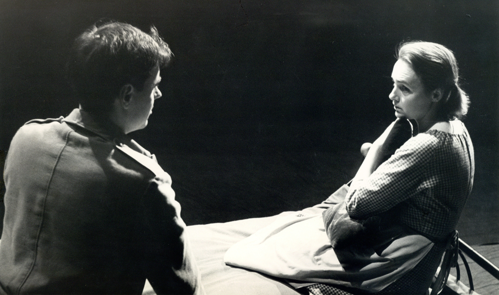 Brendan Behan, Talec, Drama SNG v Ljubljani. Na fotografiji: Danilo Benedičič (Leslie), Majda Potokar (Teresa).